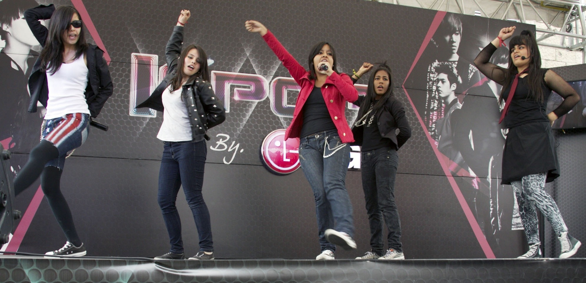 LG전자가 콜롬비아판 ‘K팝 스타’ 경연대회를 개최하며 남미 한류 마케팅을 본격화한다.